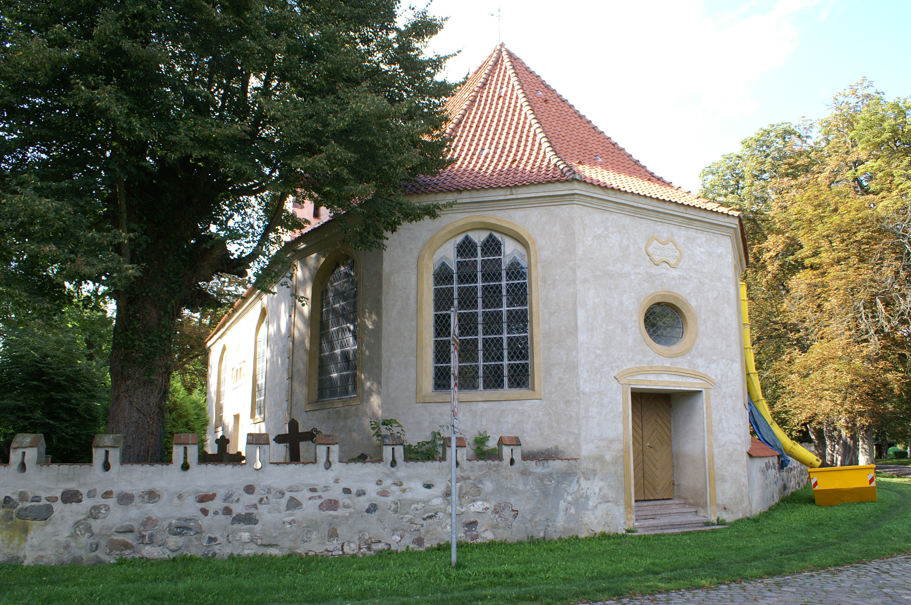 Nehringen, Landkreis Nordvorpommern, St. Andreas-Kirche, Chor